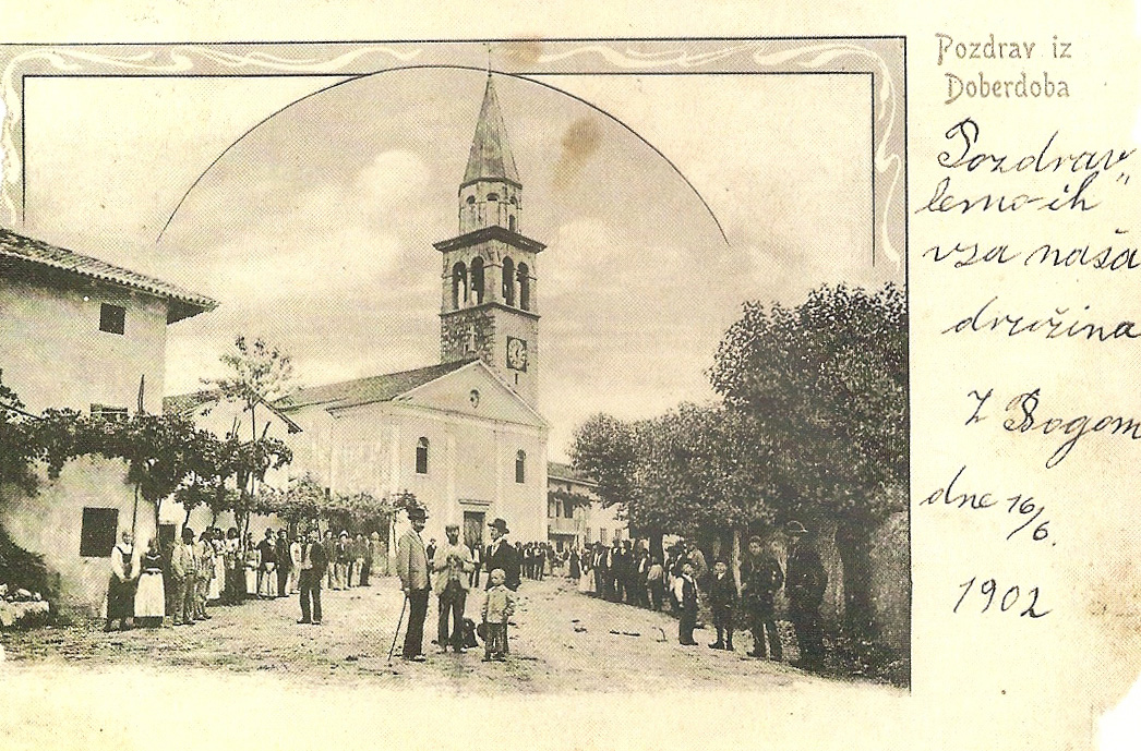 Razglednica Doberdoba.